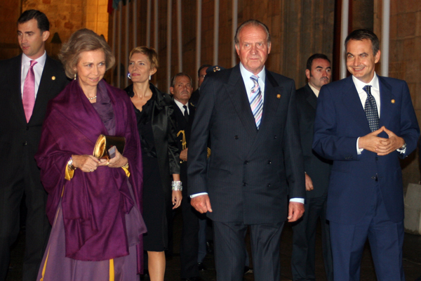 De izquierda a derecha: Felipe de Borbón y Grecia, Príncipe de Asturias, la Reina Sofia, la Princesa Letizia Ortiz, el Rey Juan Carlos, y el Presiodente del Gobierno, José Luis Rodríguez Zapatero. XV Cumbre Ibero-Americana celabrada en Salamanca en mayo de 2005.